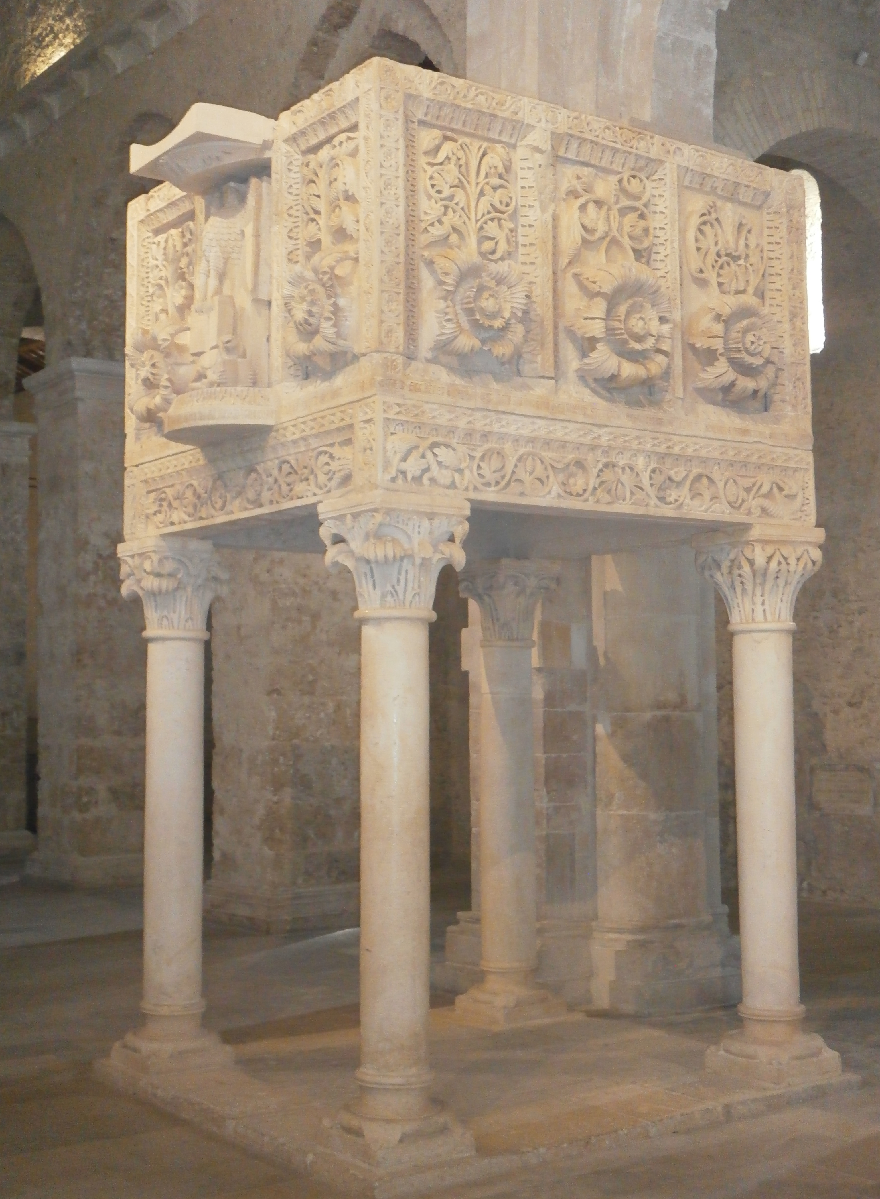 Abbazia di San Clemente a Casauria - pulpito